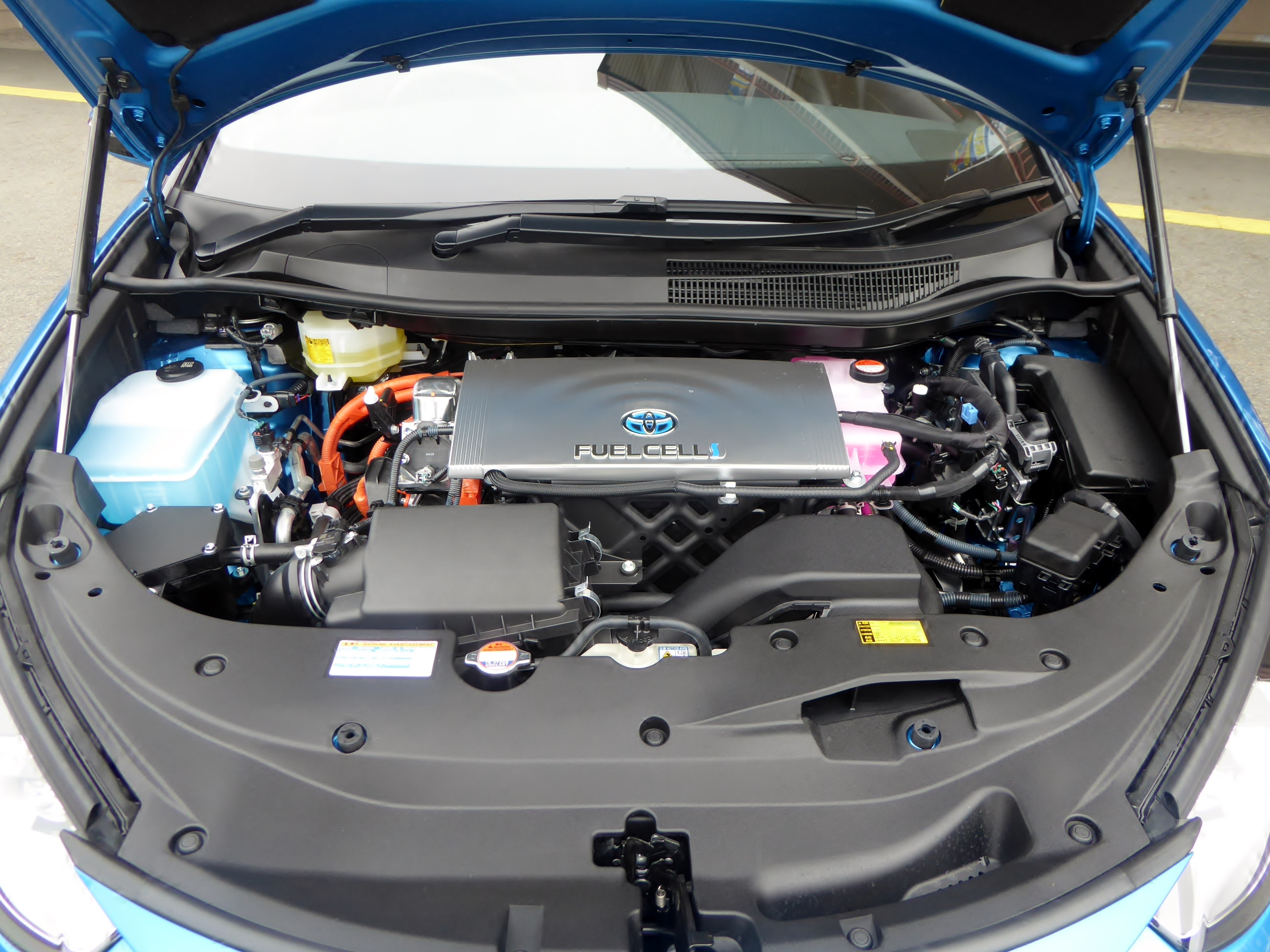 ZBA-JPD10-CEDSS型トヨタ・MIRAIのバッテリールームを撮影。